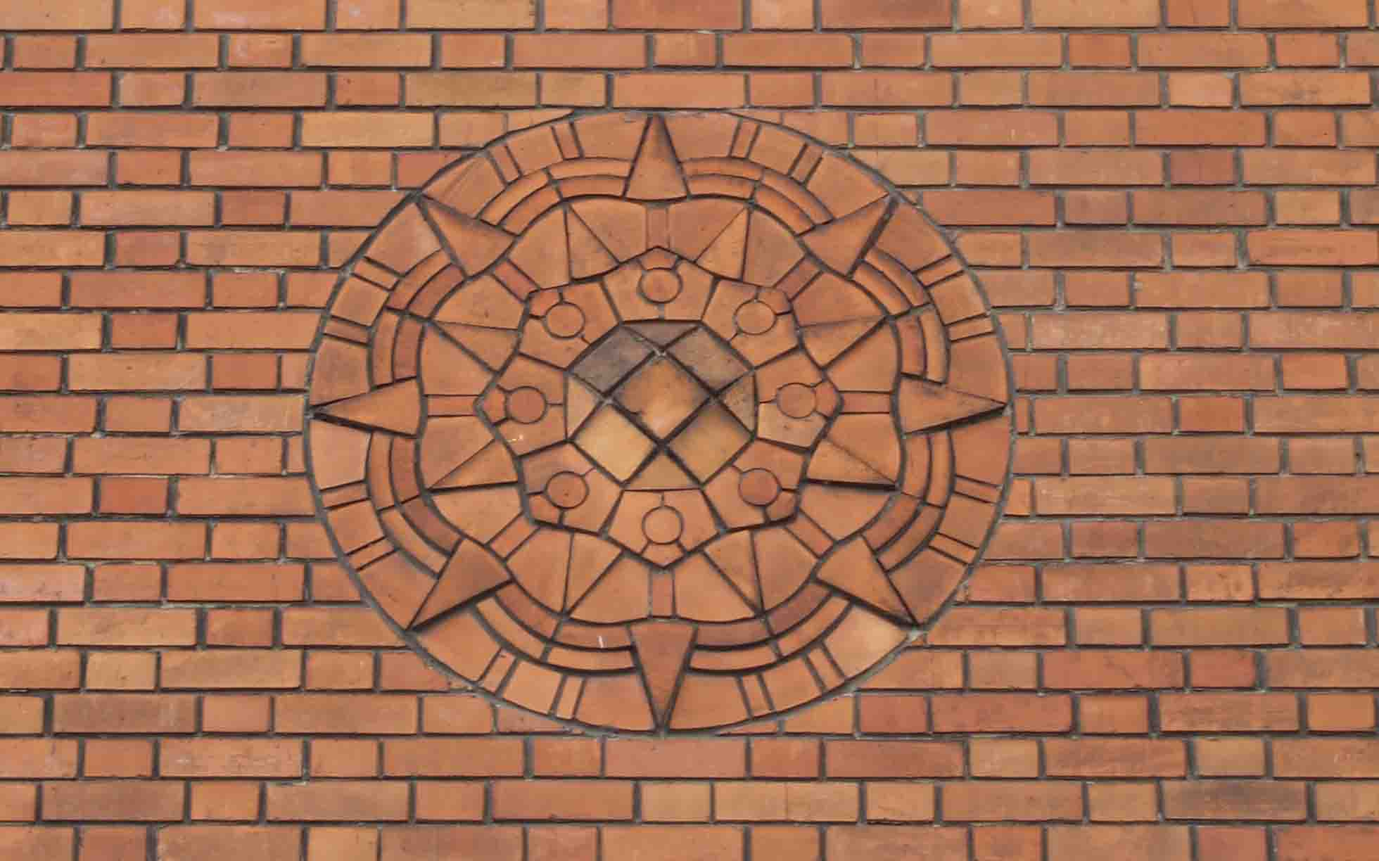 mandalas étoile de Baggio